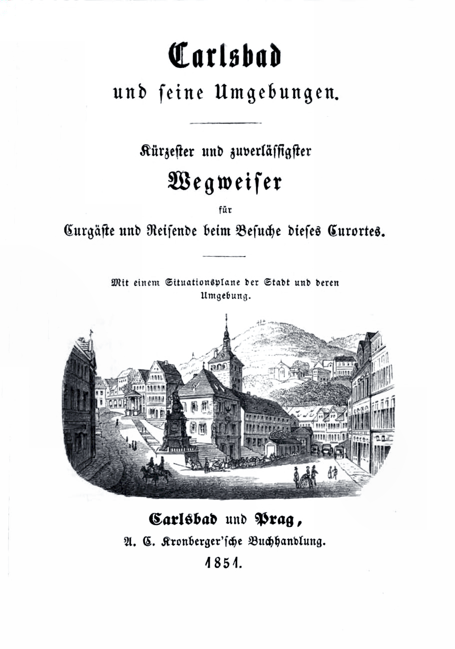 Carlsbad und seine Umgebungen, aus dem Verlag A. C. Kronberger, Karlsbad u. Prag 1851, Deckblatt